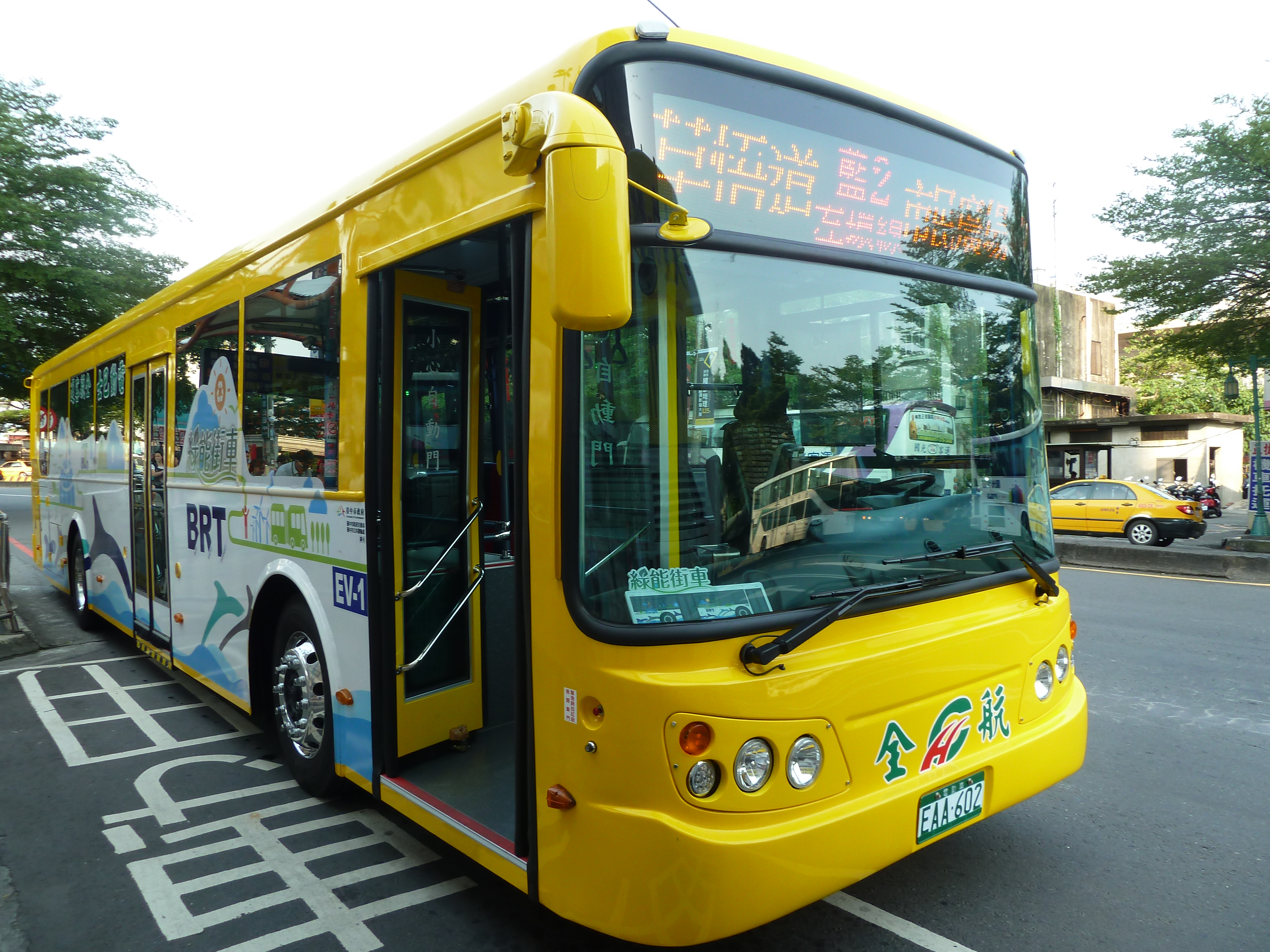 全航客運電動車EAA-602營運臺中市公車藍2線，停靠於台中火車站